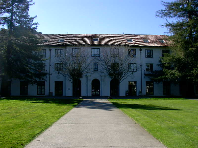 De La Salle residence hall and quad